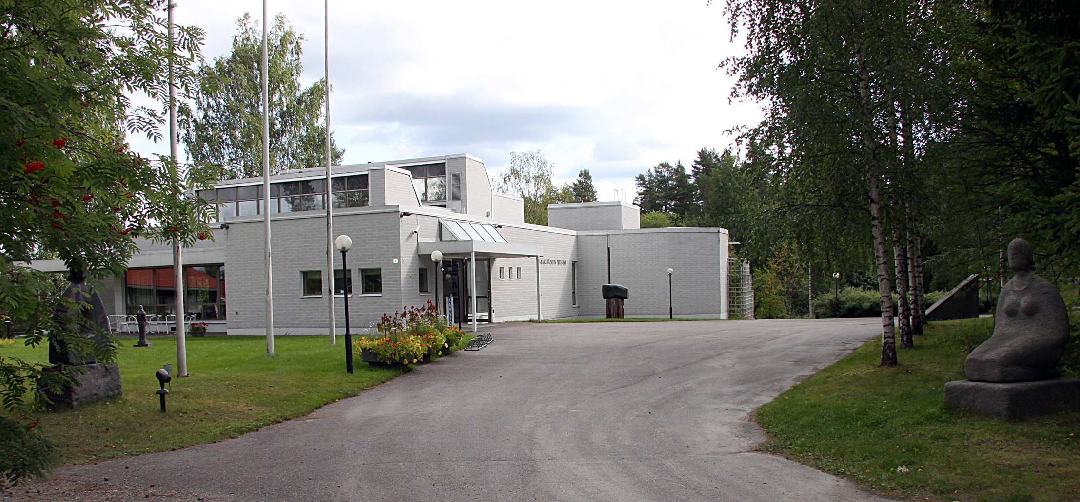 Saarijärven museon päärakennus ja sitä ympäröivä veistospuisto 19.8.2009.